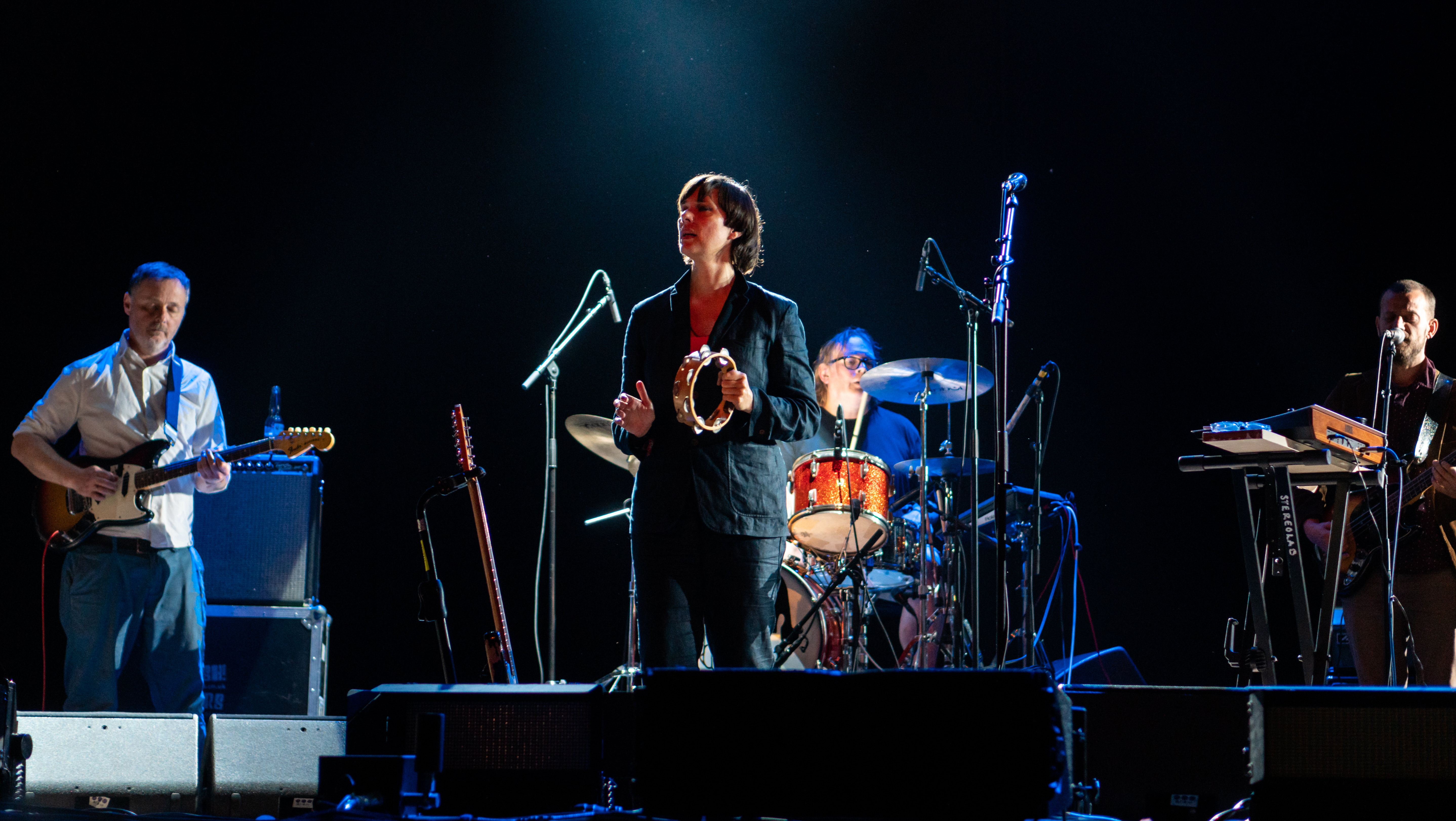 Primavera19_-338